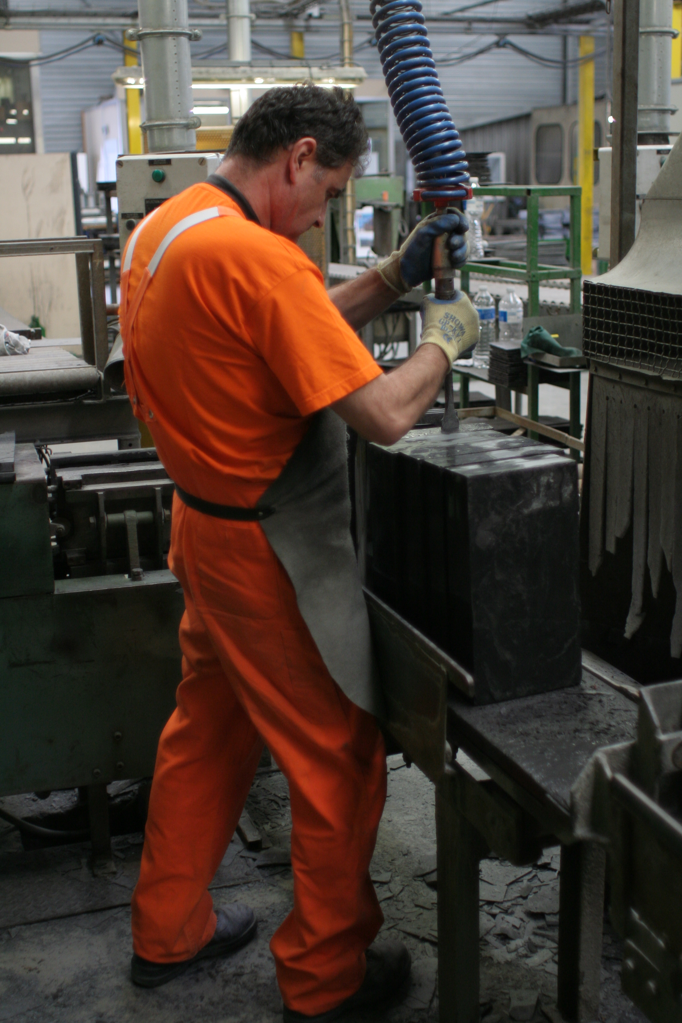 Ardoisière de Trélazé, Maine-et-Loire, France Fente des repartons : fente manuelle au ciseau pneumatique.